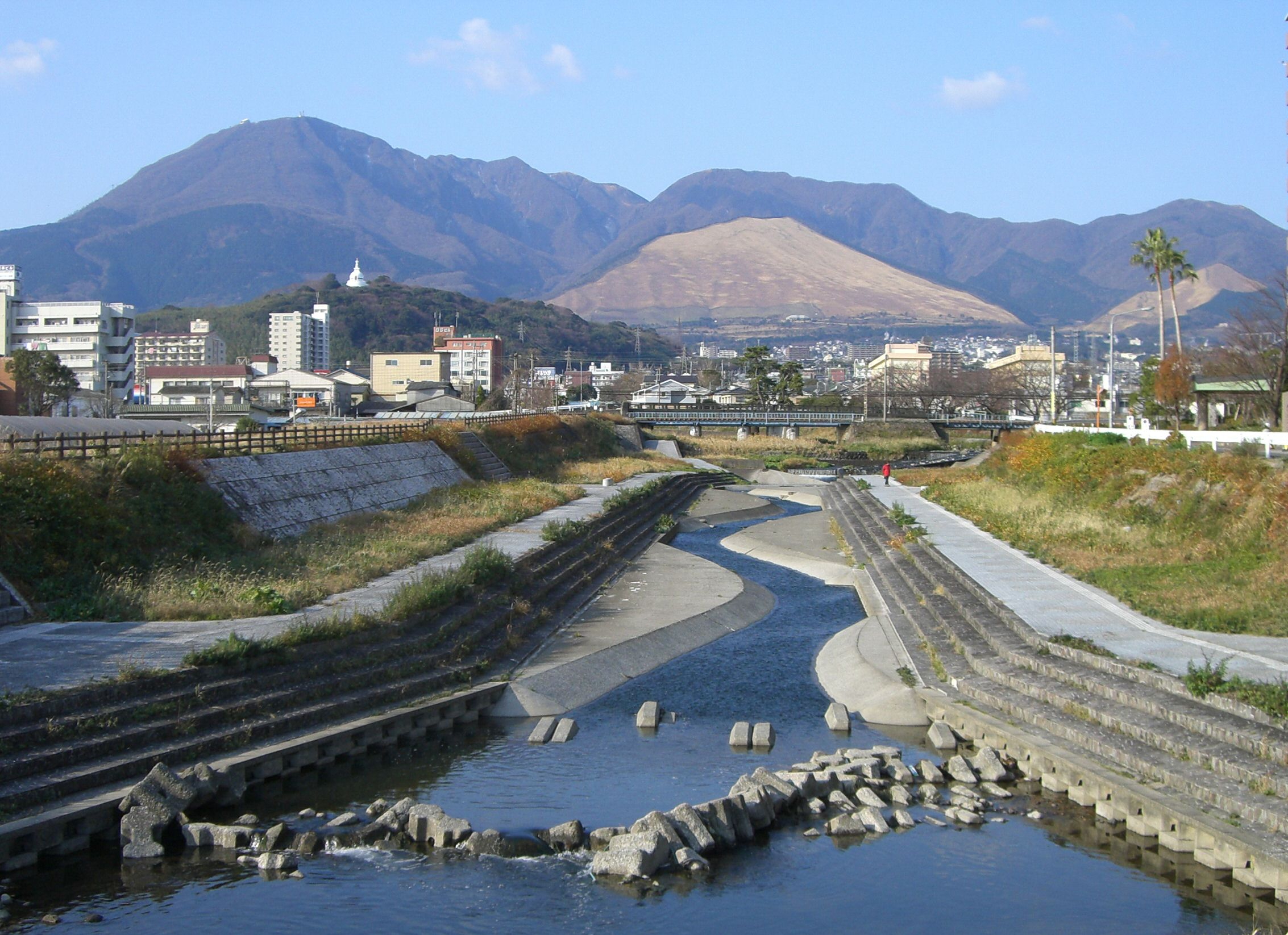 Mt.Tsurumi in Beppu, Oita, Japan